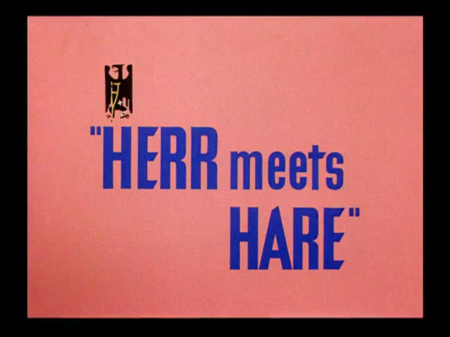 Careta d'inici del curtmetratge